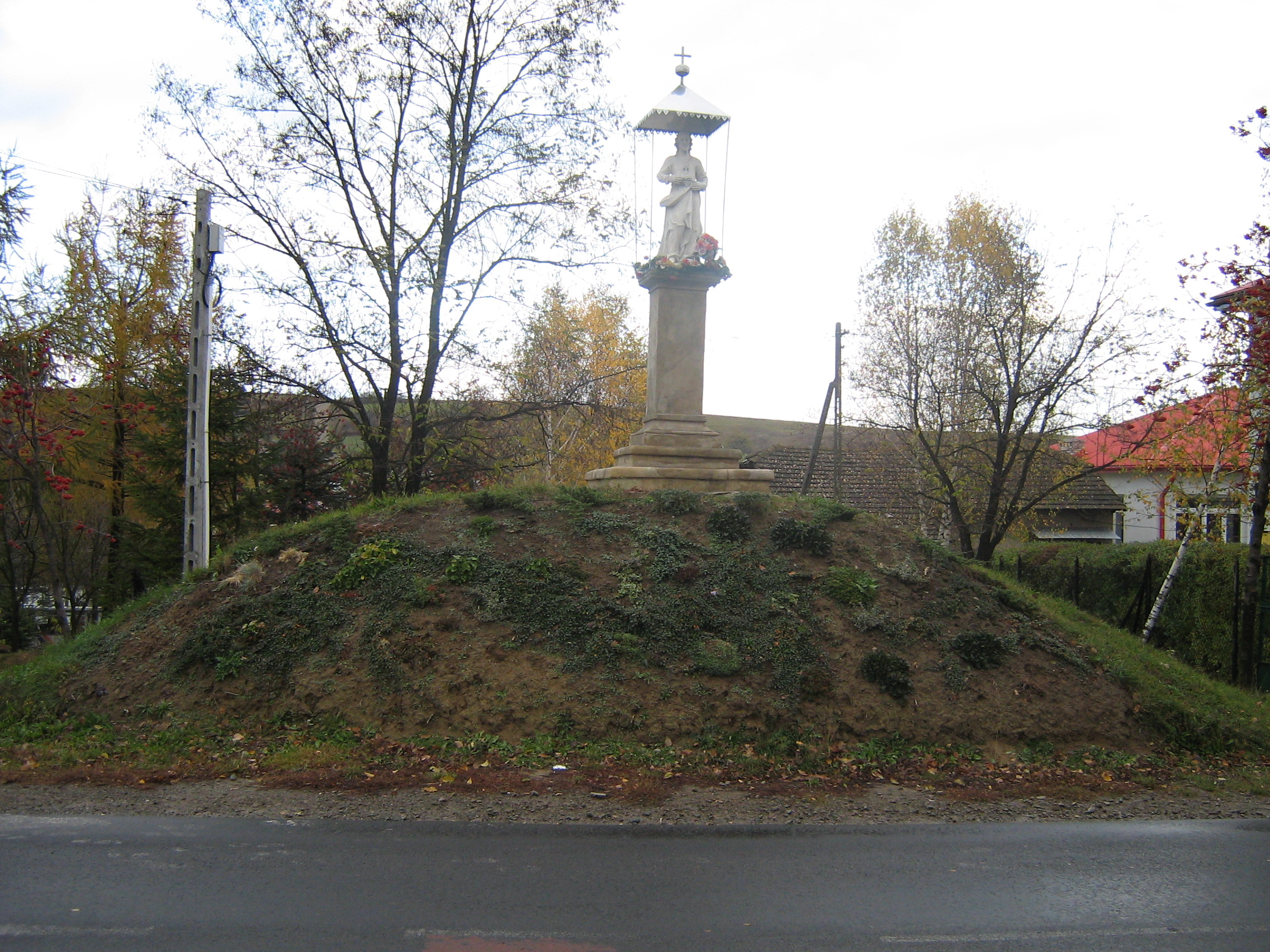 Szwedzka mogiła w Racławicach koło Biecza